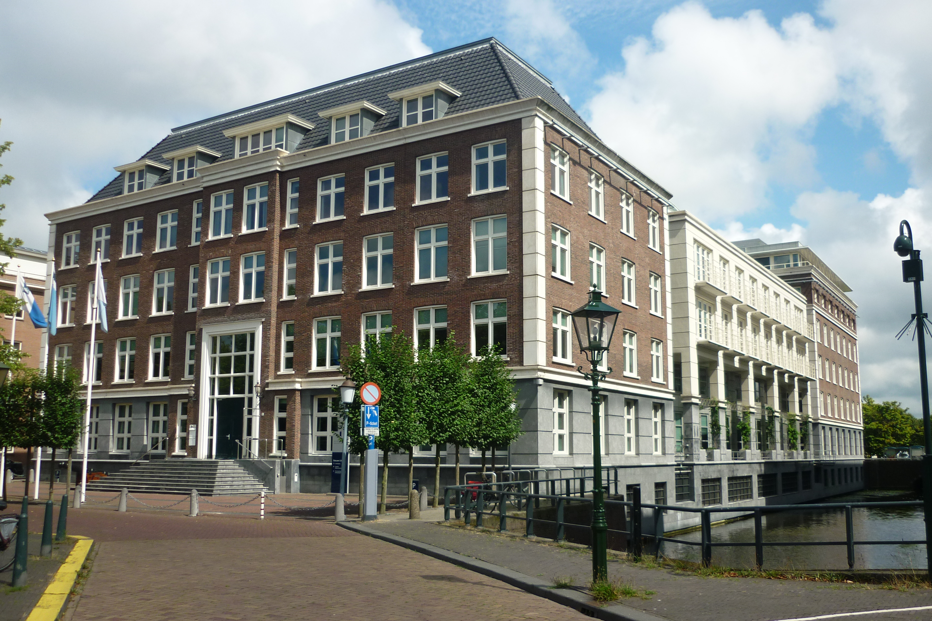 Nieuwe Uitleg 1 Den Haag, hoofdbureau van de Nationale Politie